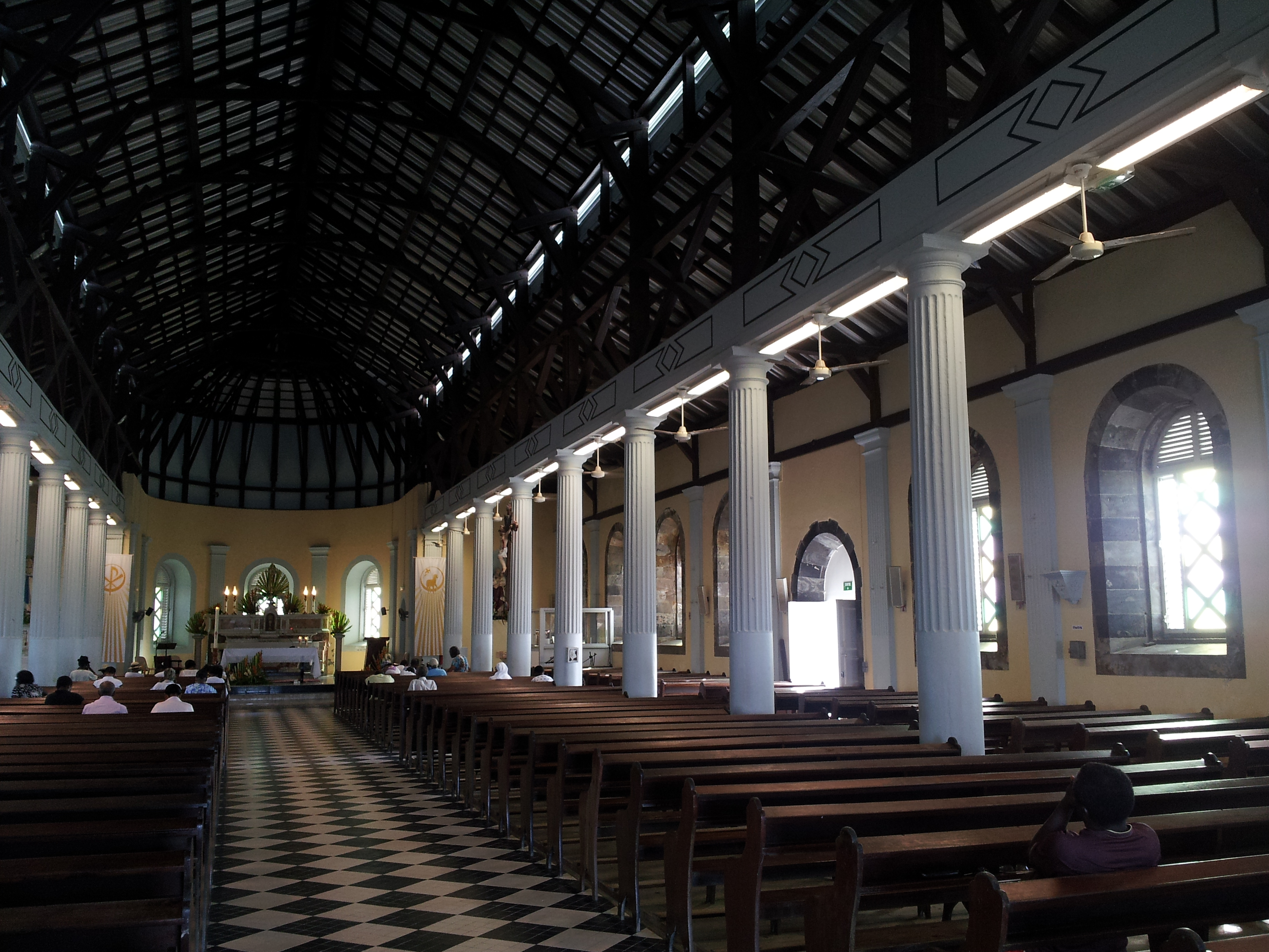 Intérieur de l'église Notre-Dame-de-l'Assomption de Sainte-Marie en Martinique